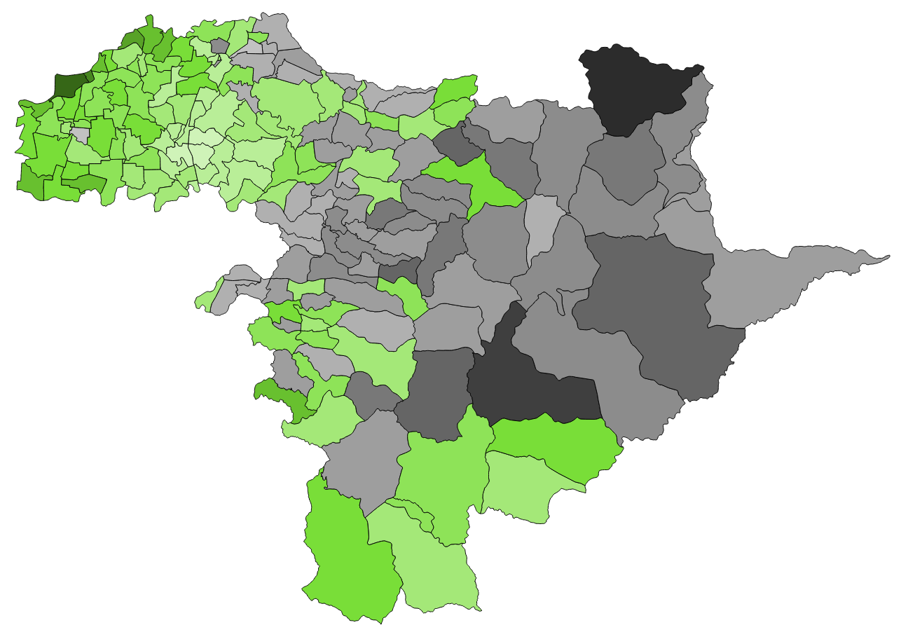 顏色對照表